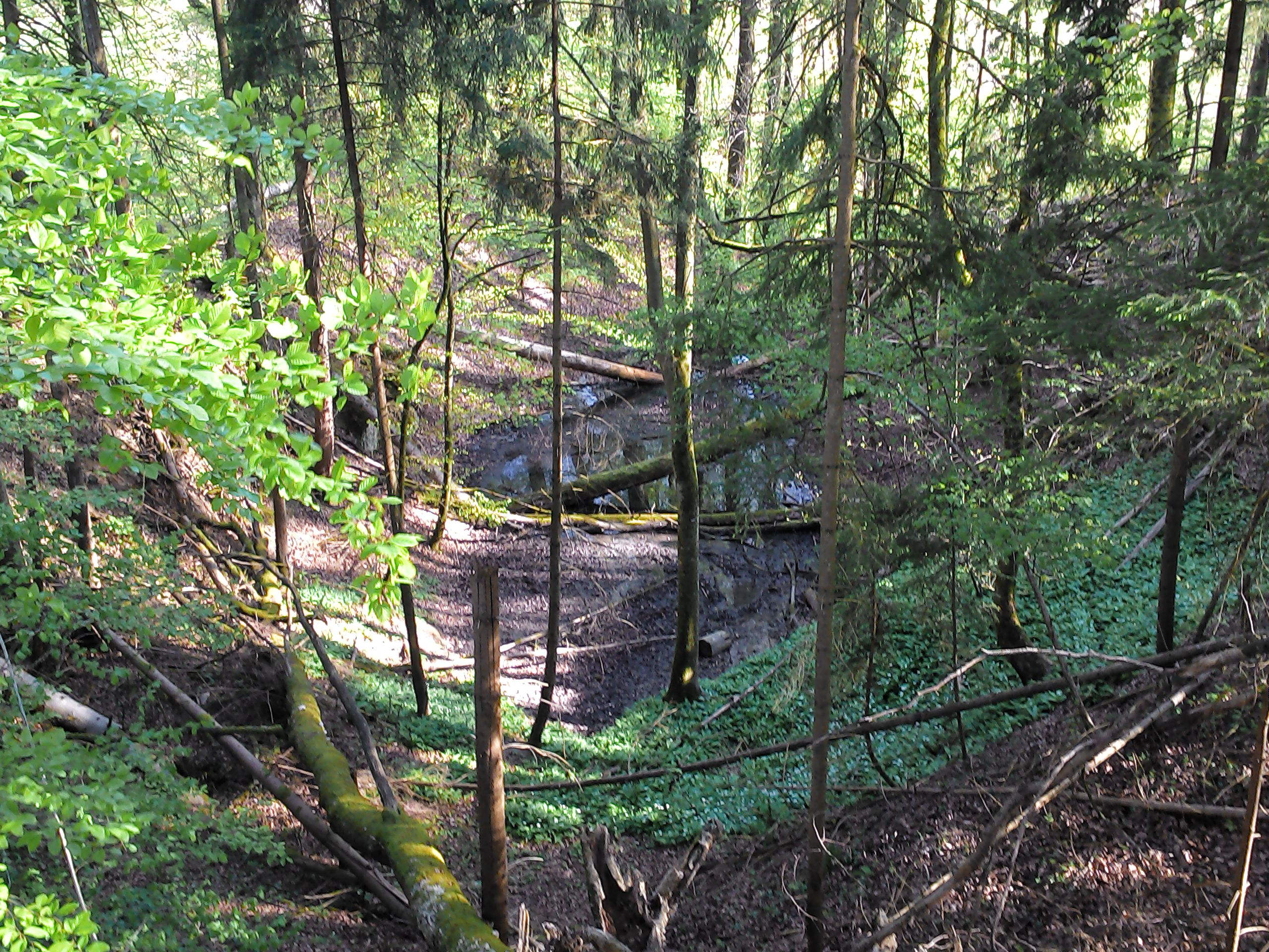 Der Erzkessel bei Küßnach, Gemeinde Küssaberg in Baden-Württemberg. Blick auf den Trichter des Kessel. Andauernd mit Wasser gefüllt.